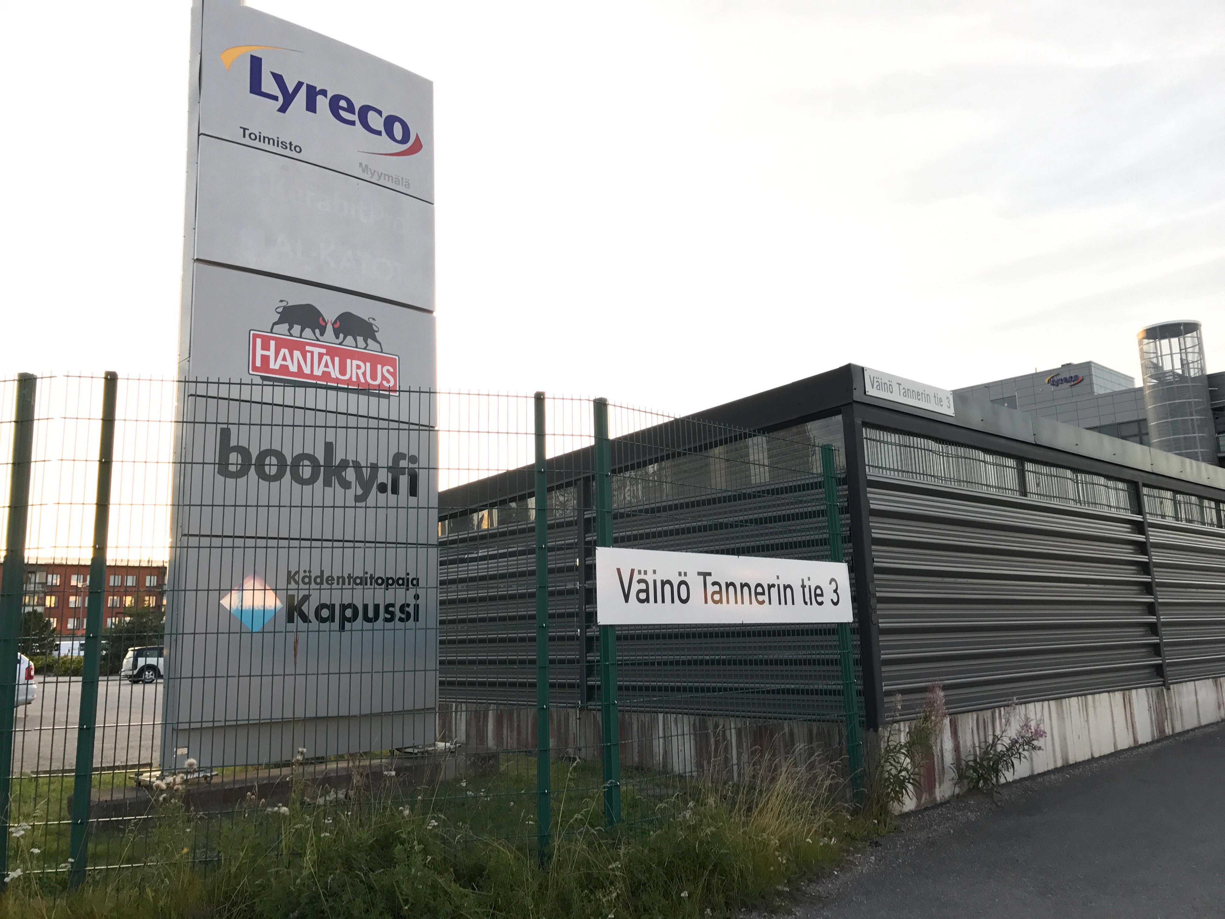 Booky.n toimisto ja varasto Vantaalla.